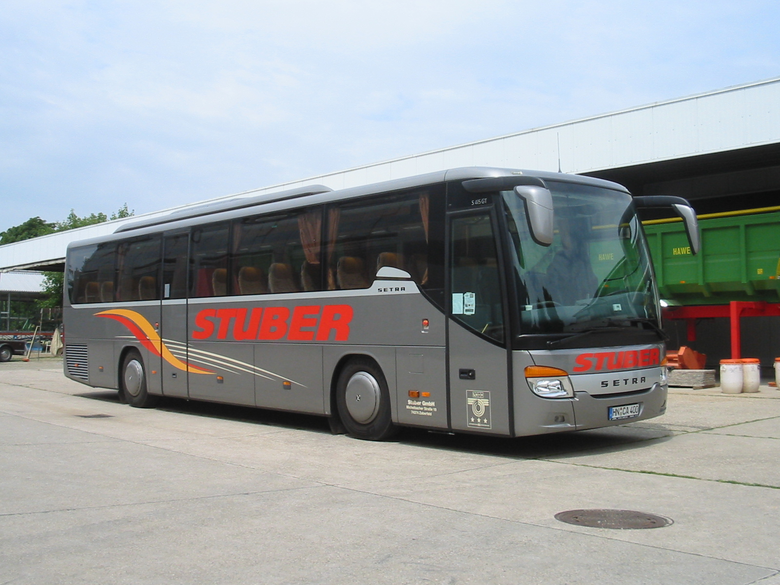 Setra-Reisebus S 415 GT; Fa. Stuber-Reisen, Zaberfeld (2006) eigenes Foto / alle Rechte freigegeben